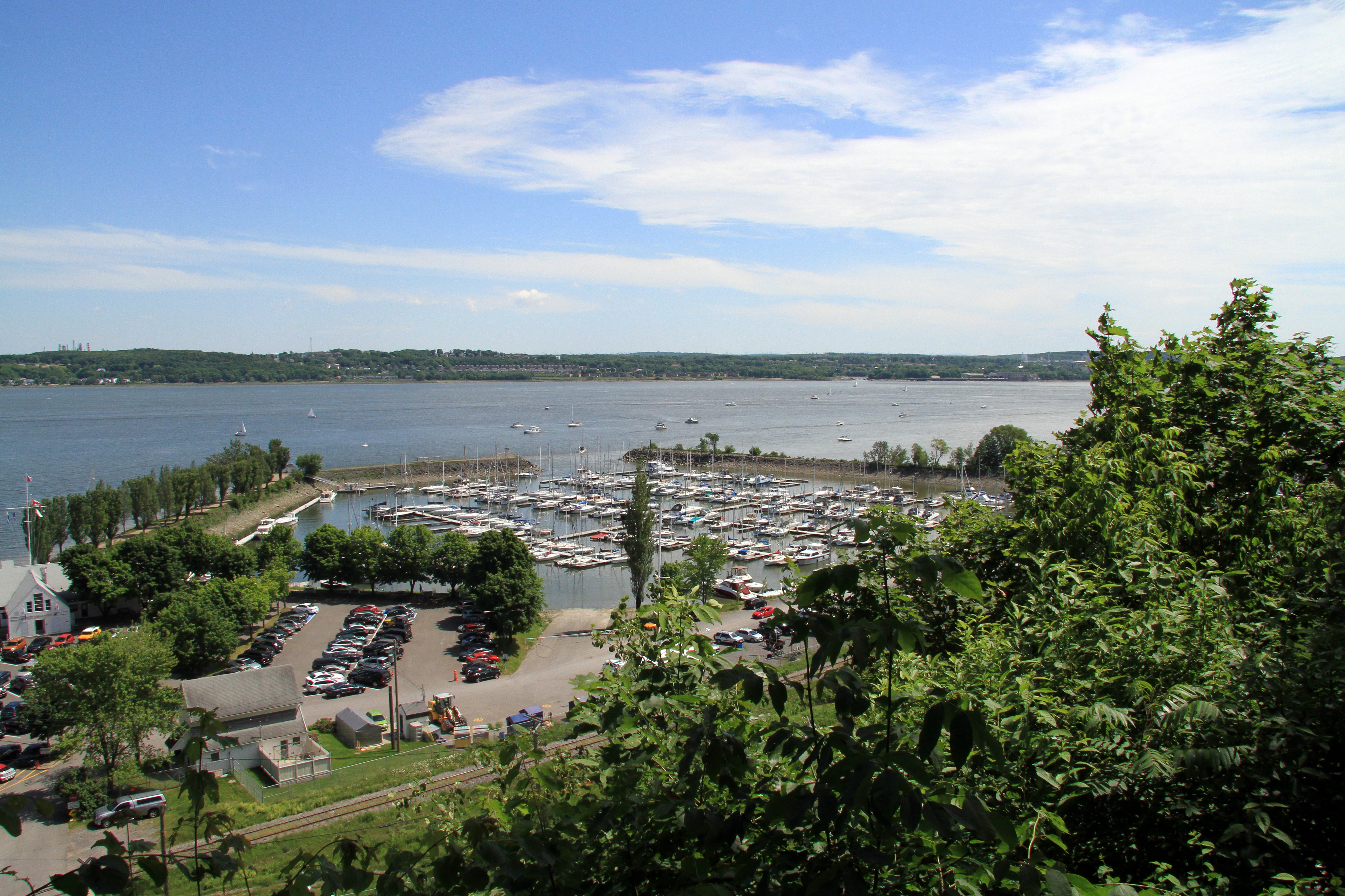 Vue du belvédère